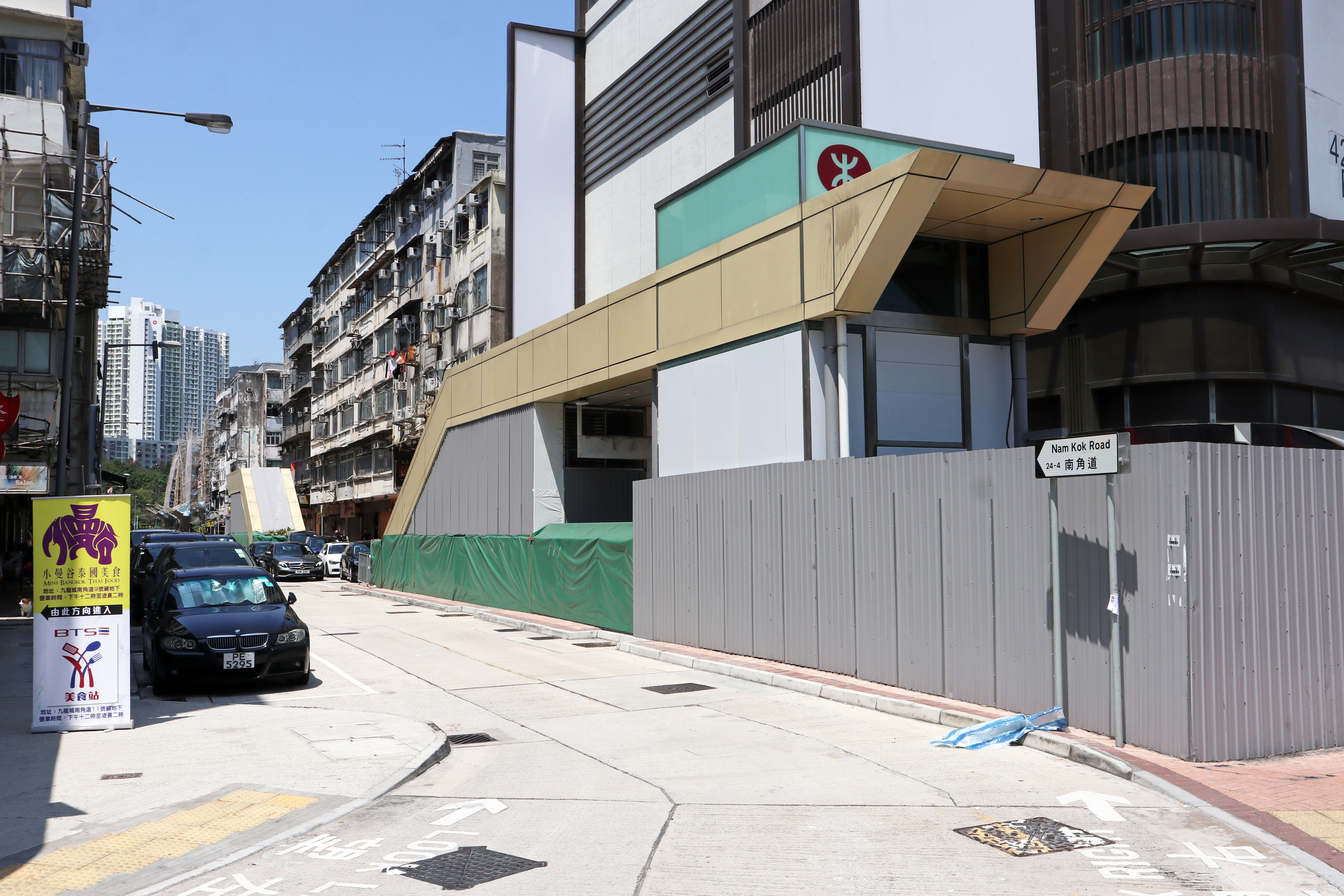 港鐵宋皇臺站B出入口外觀